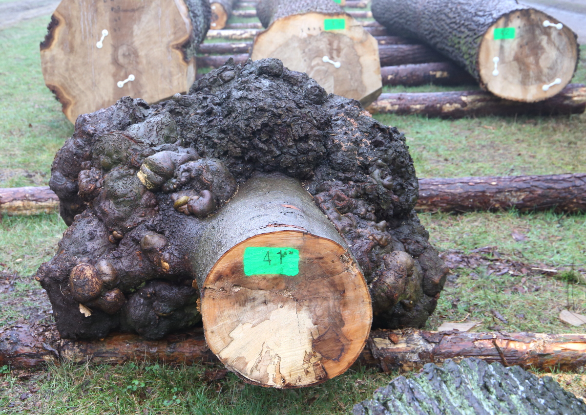 Maserknollen am Stamm einer gefällten Buche auf dem Holzlagerplatz des Landes Mecklenburg-Vorpommern beim Forsthaus Drewitz.